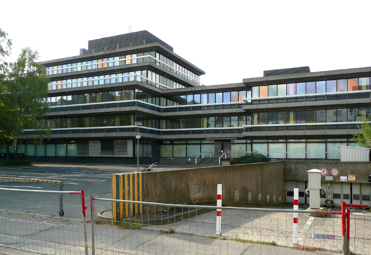 Rückseite IBM Gebäude Hannover